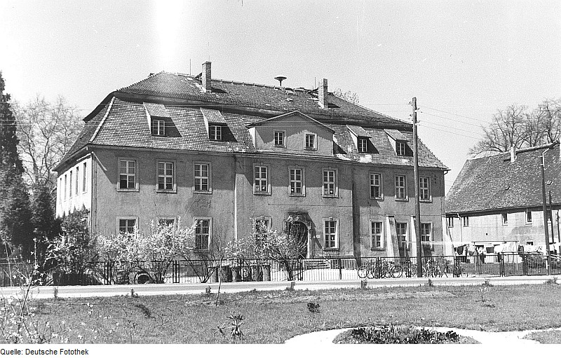 Original image description from the Deutsche Fotothek Rietschen-Daubitz. Schloß